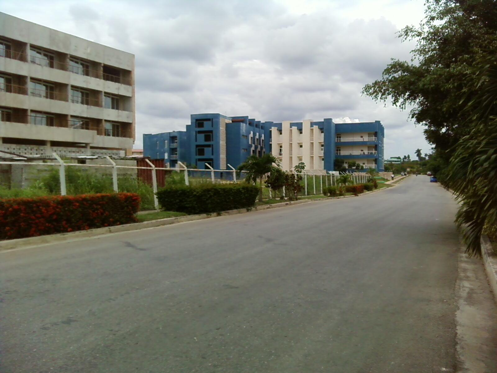 Vista de la entrada a la UCI y los docentes nuevos